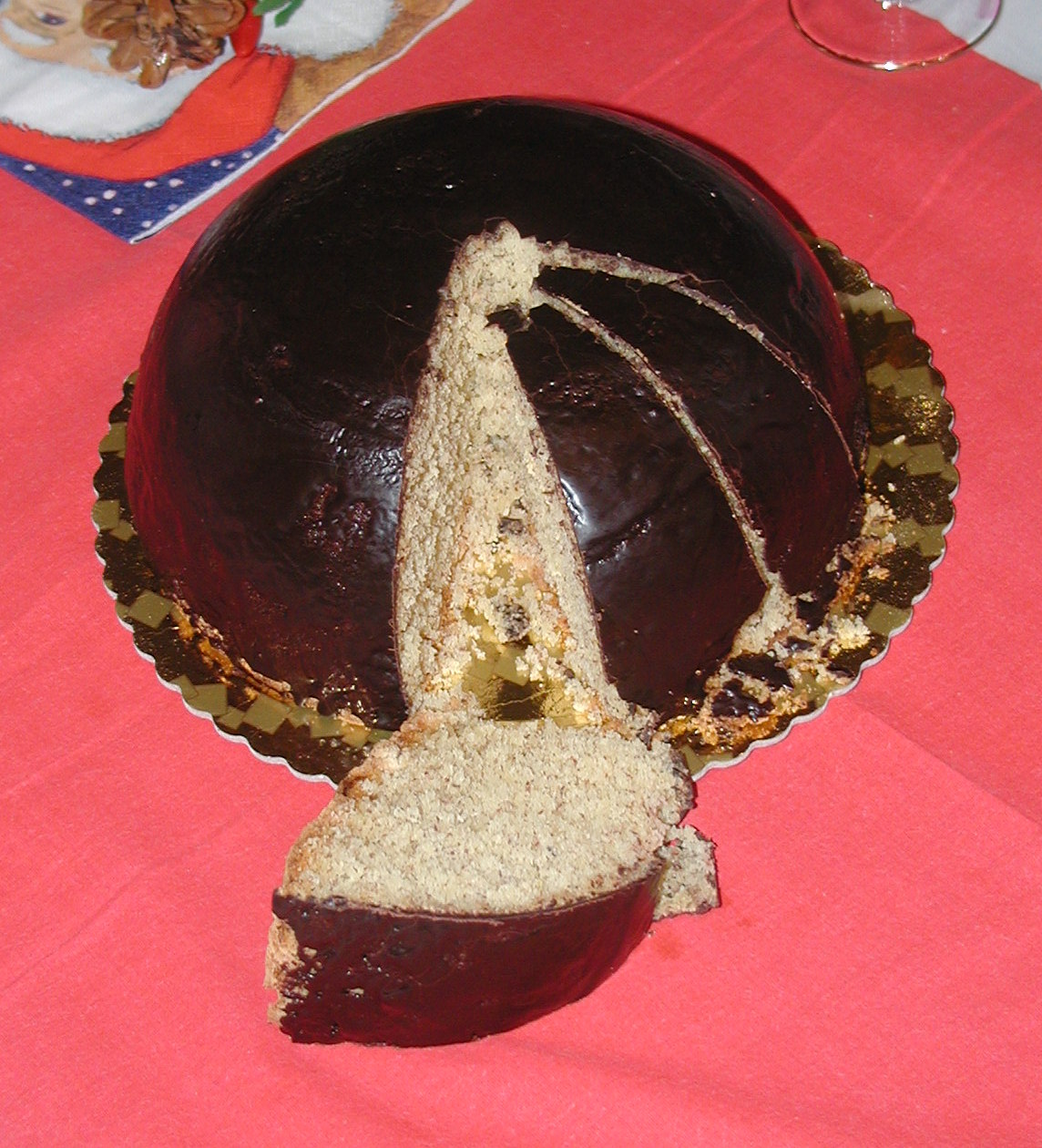 Parrozzo, ein ital. Kuchen